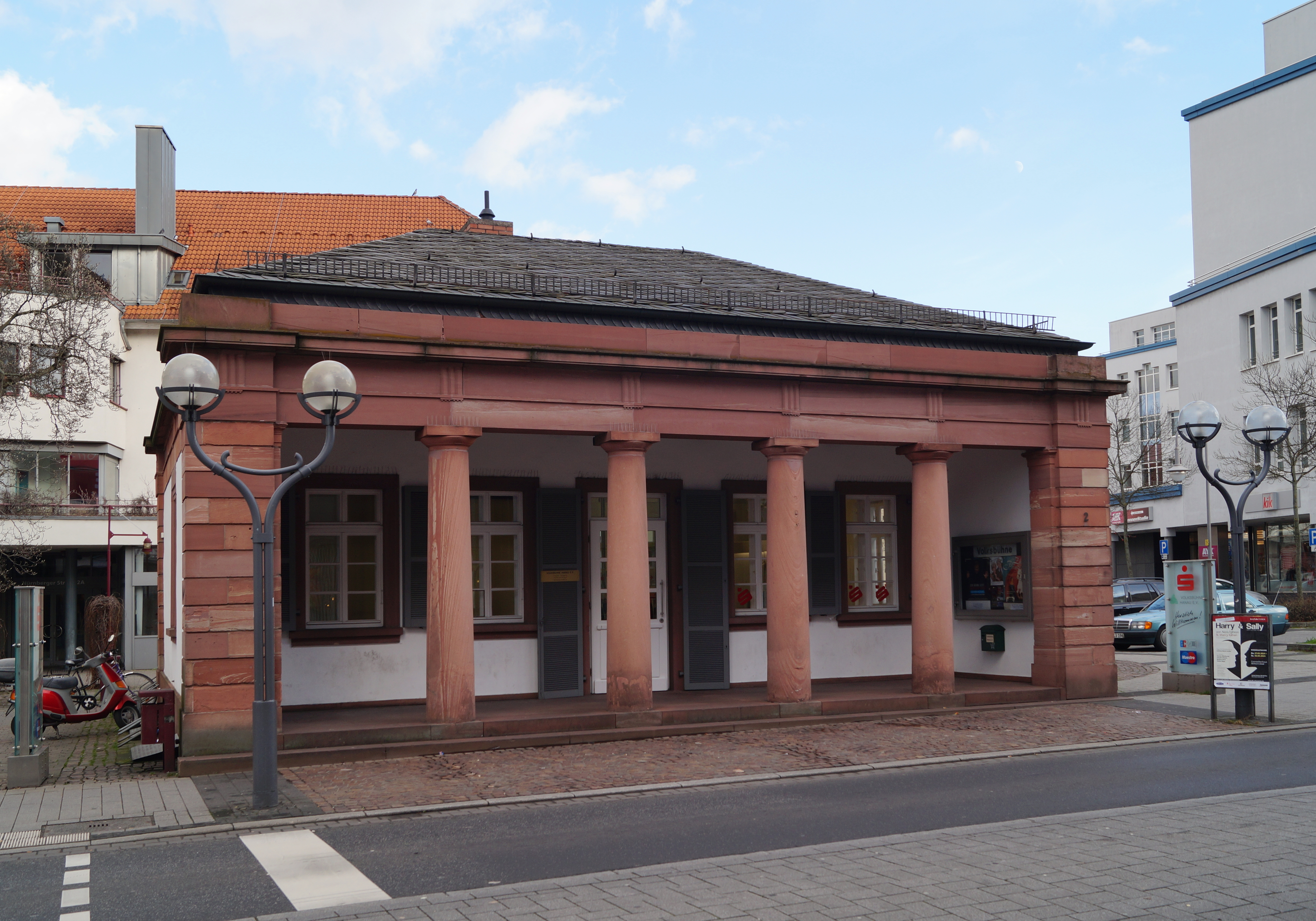 Nürnberger Tor in Hanau - klassizistischer Pavillon als einziger erhaltener Teil der Anlage von 1820.